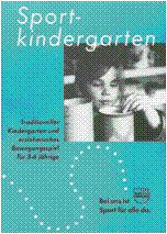 Sportkindergartenkonzeption